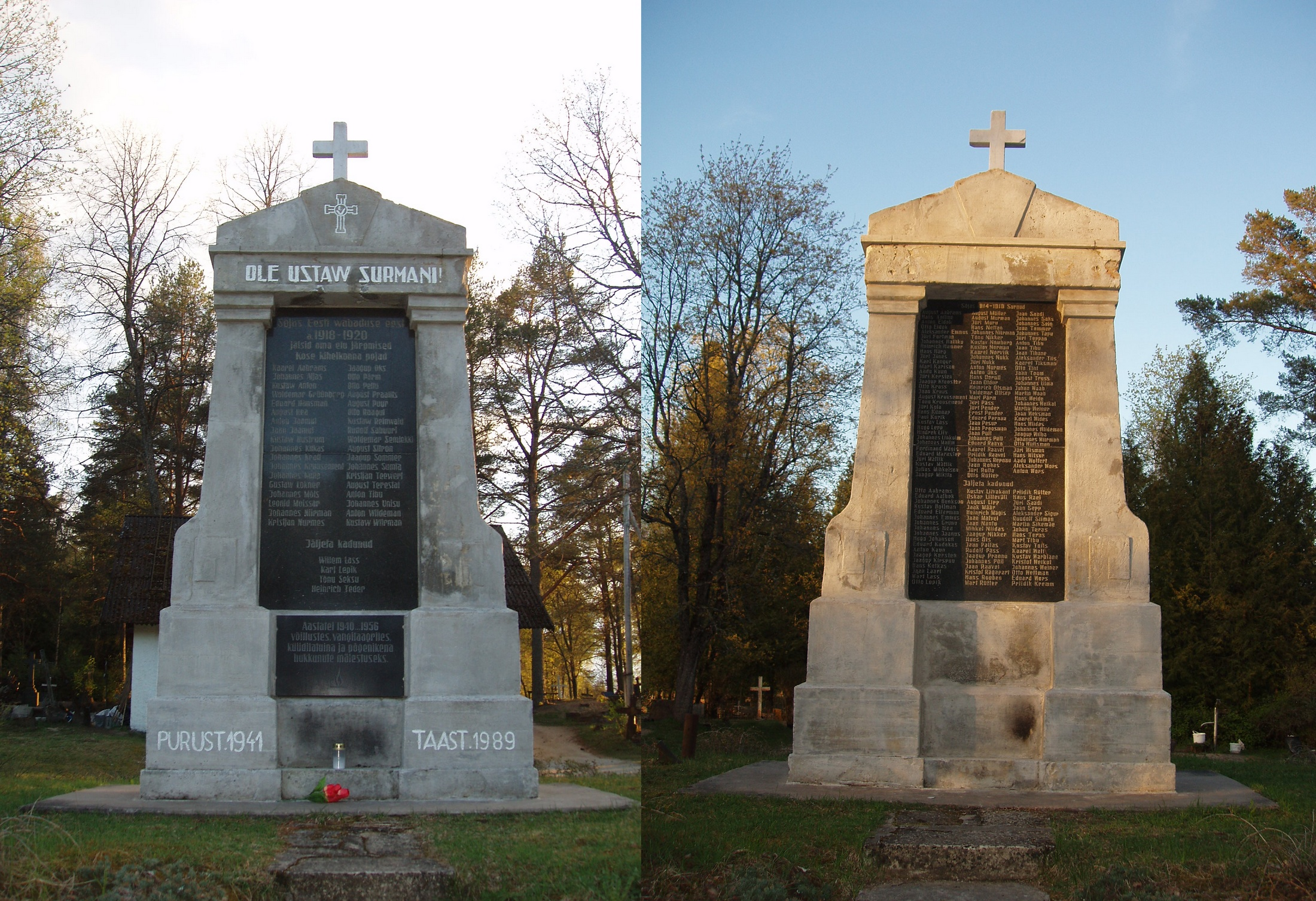 Pildil on Kose kalmistul paiknev mälestussammas Vabadussõjas ja Esimeses maailmasõjas langenud Kose kihelkonna meestele vaadatuna mõlemalt küljelt.